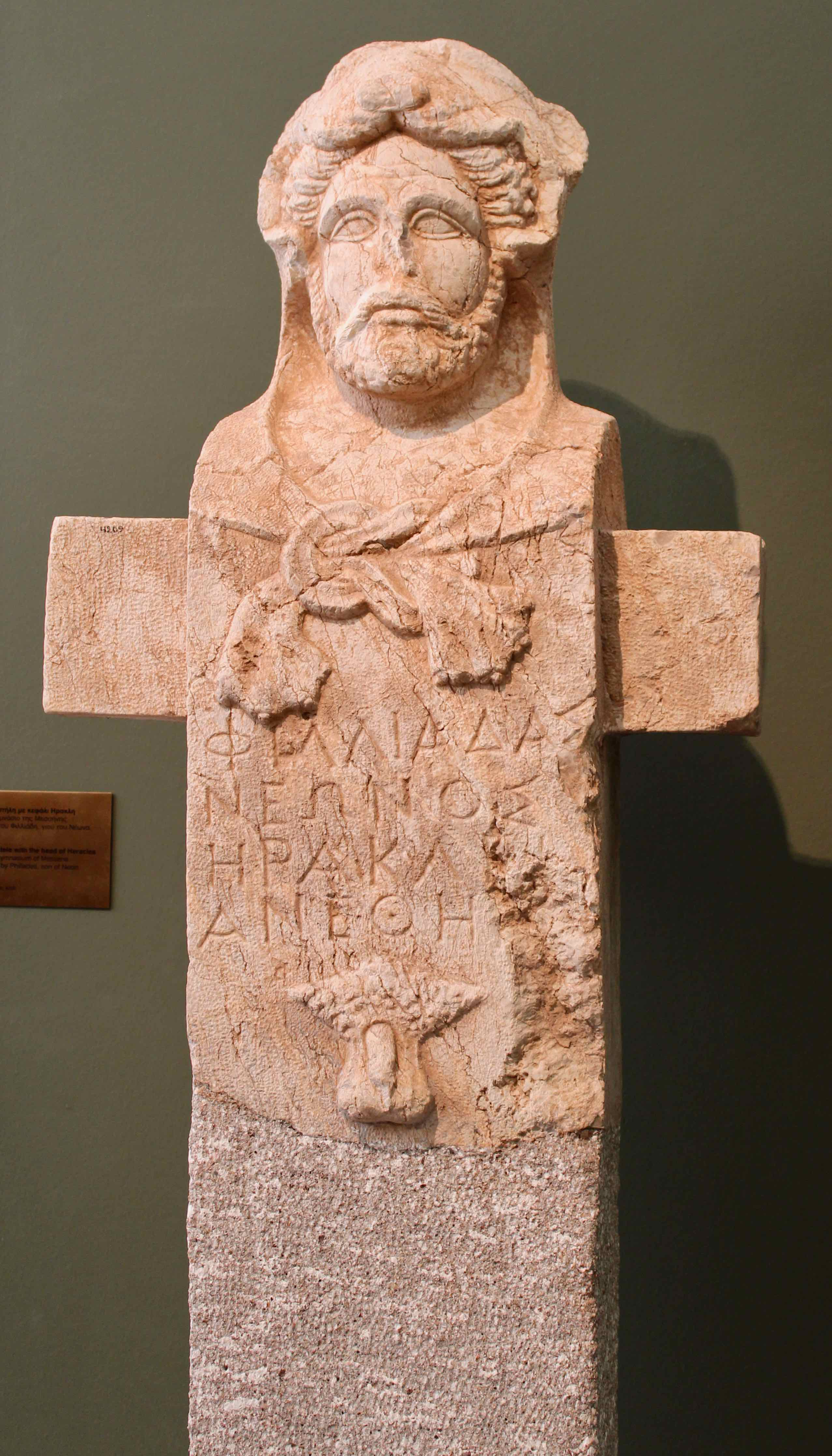 Ερμαϊκή στήλη με κεφαλή Ηρακλή (Ερμηρακλής). Μουσείο Αρχαίας Μεσσήνης.